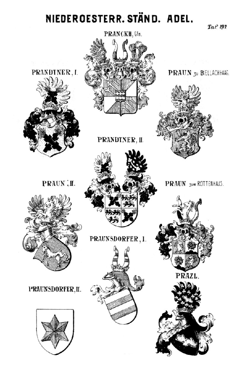 Tafel 197 des niederösterreichischen Siebmachers; Pranckh, Prandtner, Praun, Praunsdorfer, Prazl